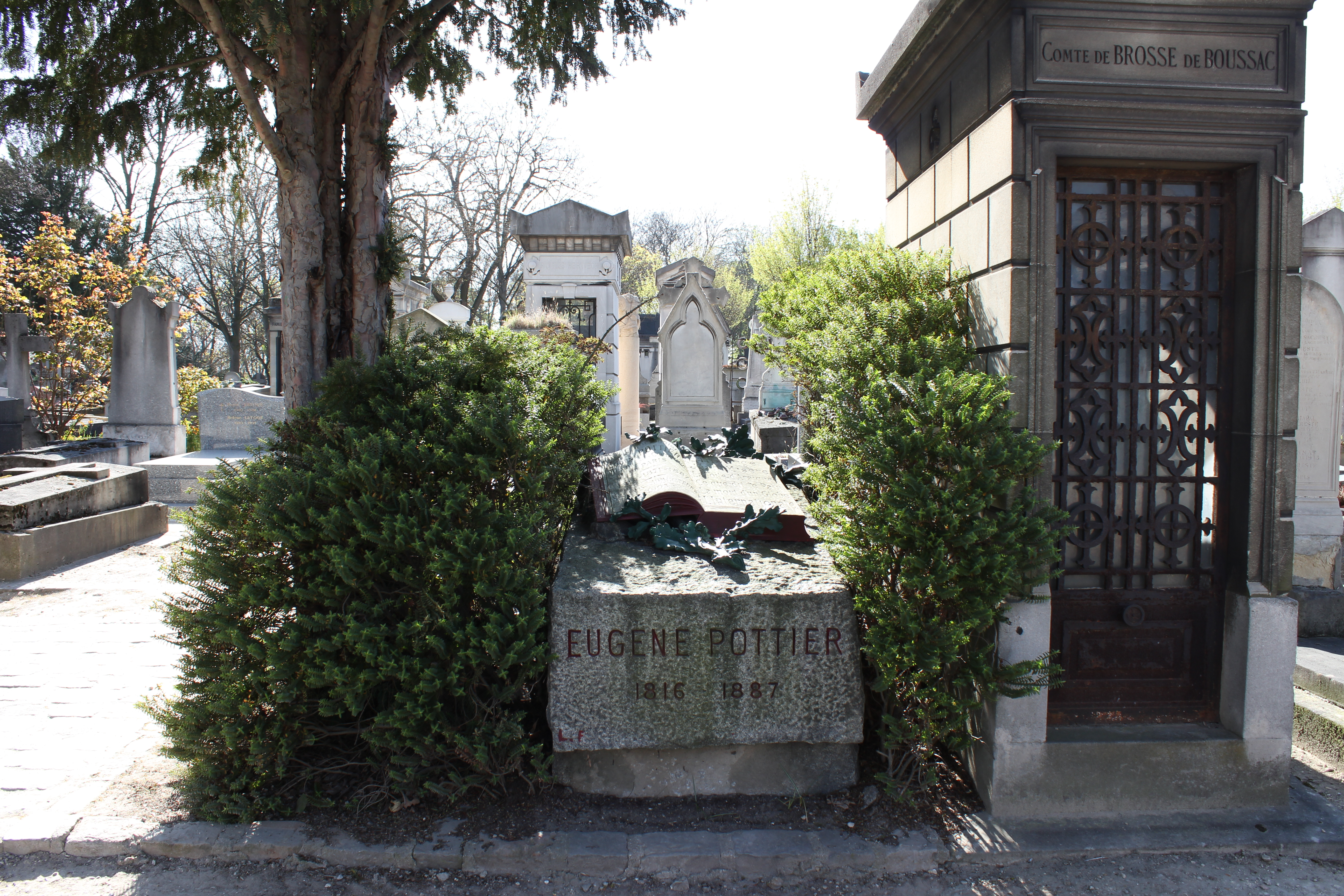 Monument composé d'un bloc de granit gris sur le quel est posé un livre ouvert en marbre blanc. Sur le livre sont gravés les titres des principaux poèmes de Pottier. Concession perpétuelle gratuite par délibération du Conseil municipal de Paris en date du 7 et 11 novembre 1887 ou arrêté préfectoral du 7 novembre 1887.vue d'ensemble